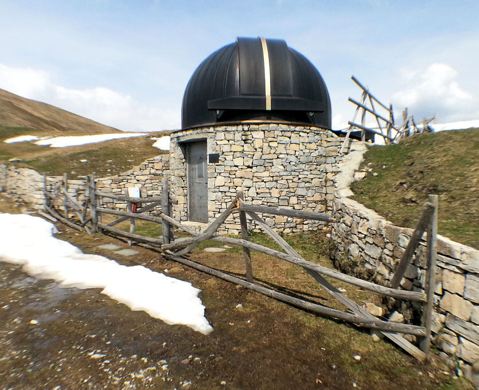 Osservatorio astronomico Monte Galbiga. L'osservatorio è posto sulle pendici del Monte Galbiga, ad una quota di 1600 m., in prossimità del Rifugio Venini. L'edificio è stato stato costruito nel 2002 all'interno di una piazzola per artiglieria facente parte delle fortificazioni della Linea Cadorna.